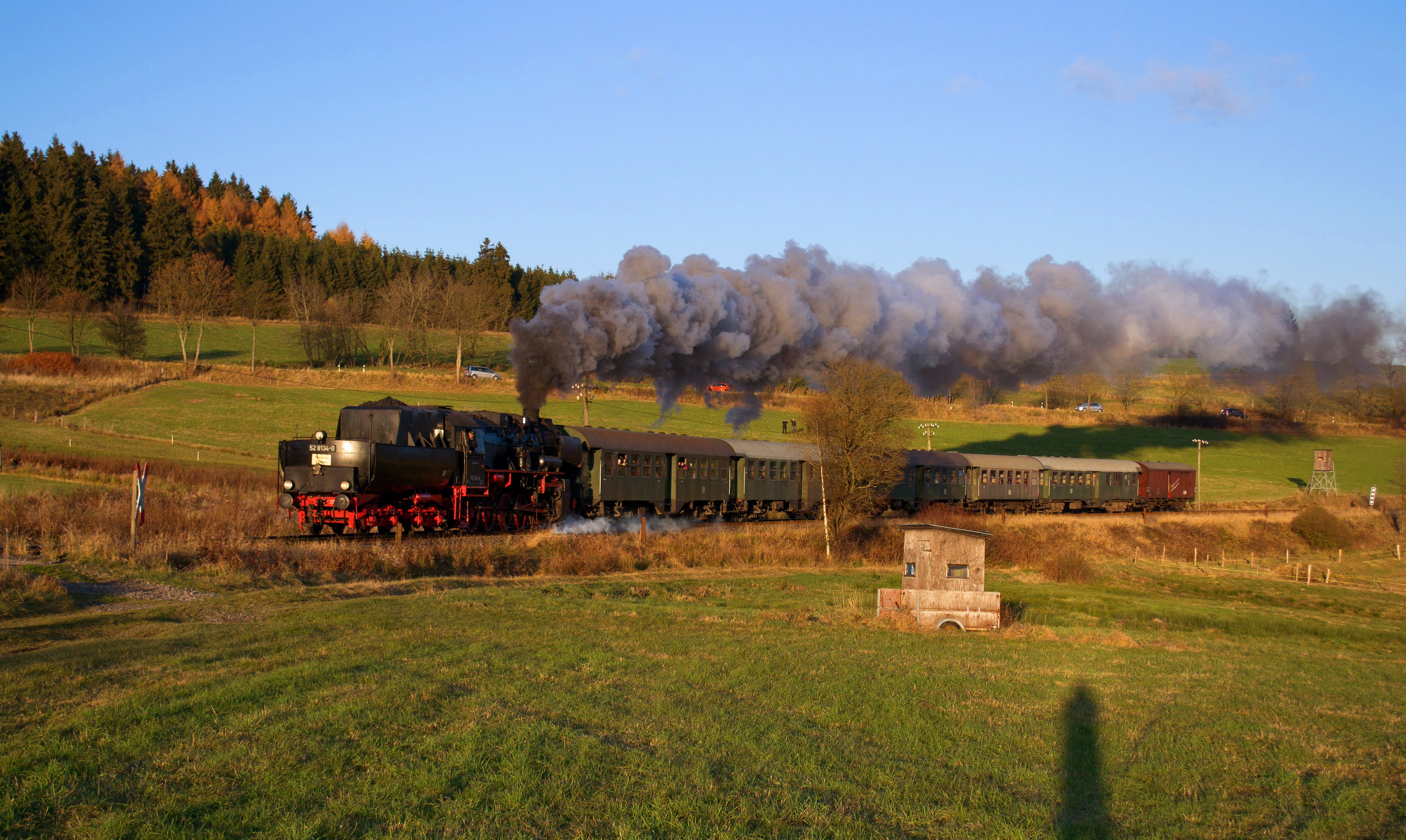 Die Dampflokomotive 52 8134-0 bei einer Sonderfahrt zwischen Hilchenbach-Lützel und Erndtebrück.